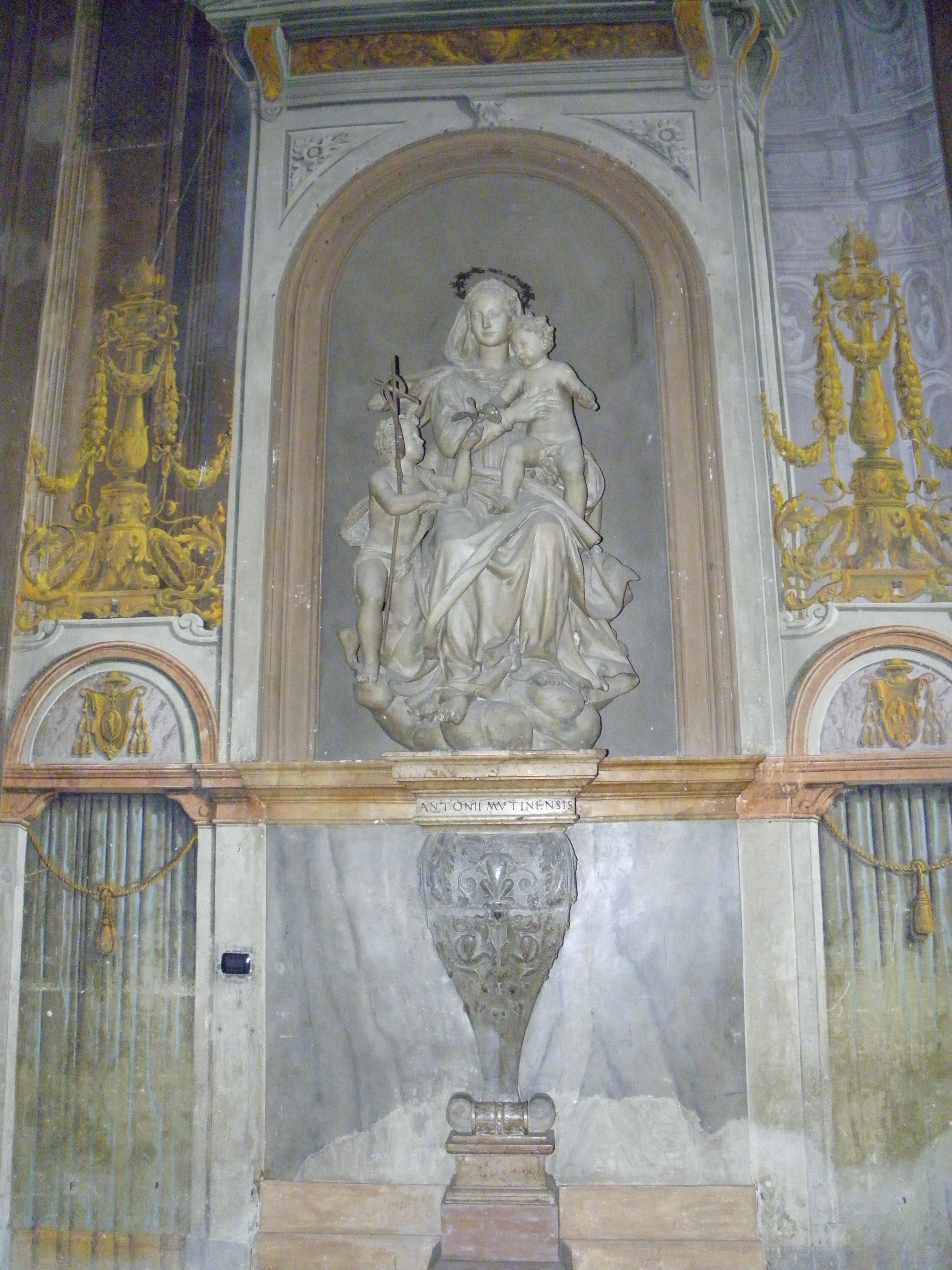 Parma, chiesa di San Giovanni Evangelista: interno, la statua della Madonna col Bambino e San Giovannino, opera dello scultore Antonio Begarelli.